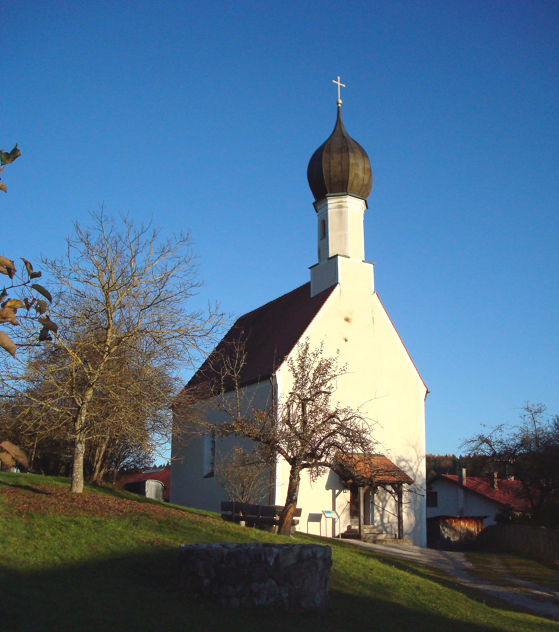 Berg am Starnberger See, OT Harkirchen, Kirche St. Peter und Paul. Die kleine Filialkirche wird bereits um 995 als Teil eines ehemaligen Herrensitzes erwähnt. Im 14. Jahrhundert erfolgte wohl ein Neubau, der im 18. Jahrhundert renoviert und mit einem Zwiebeltürmchen ausgestattet wurde. This is a photograph of an architectural monument.